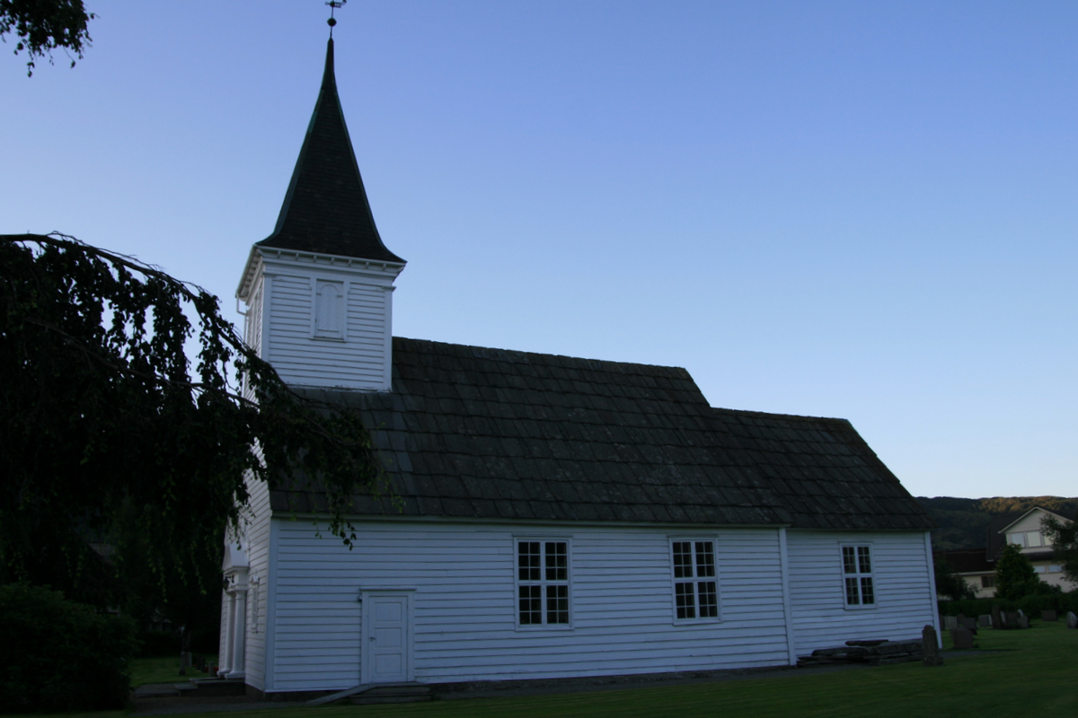 Gjerde kirke